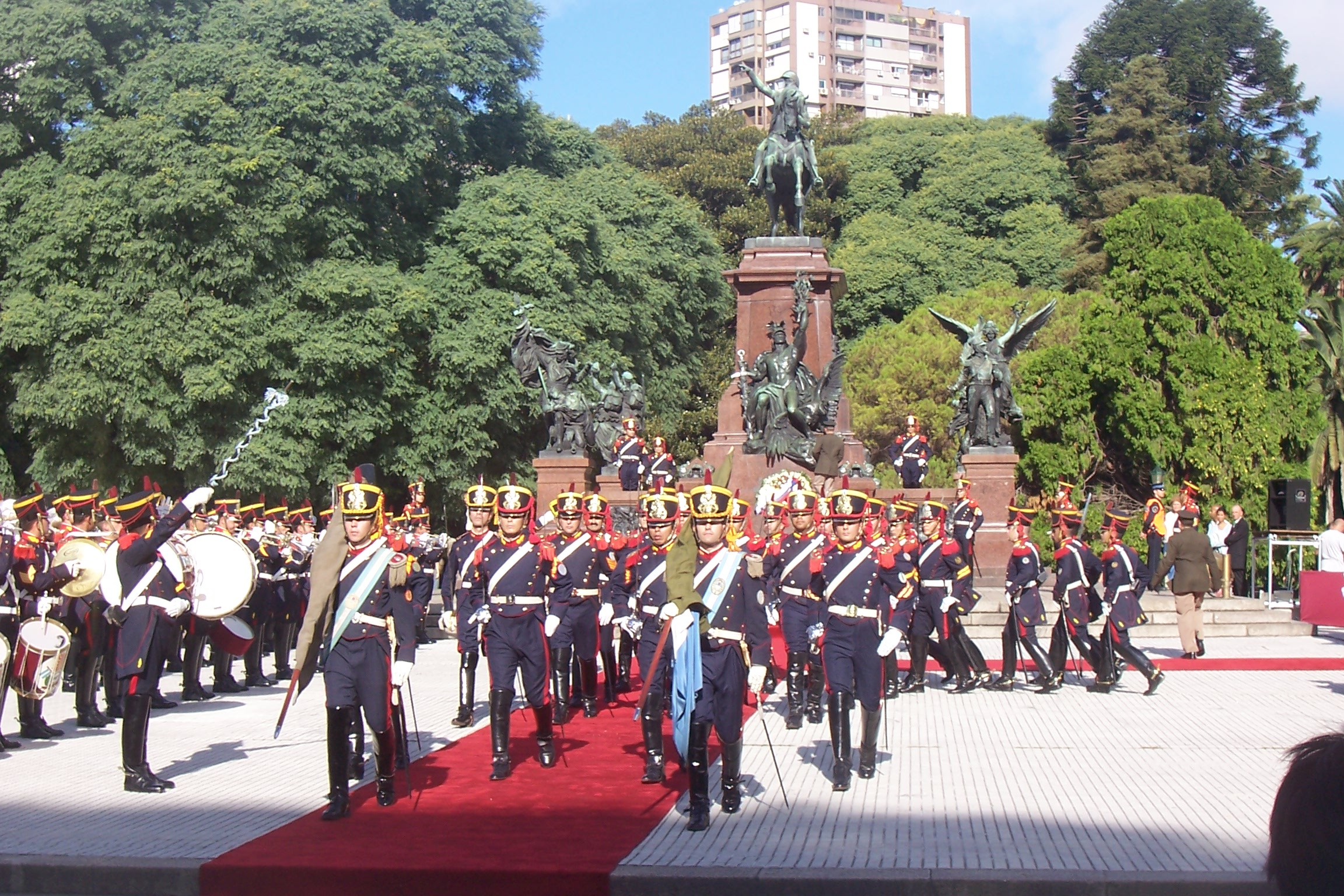 Granaderos a caballo "San Martín", en un acto protocolar por la llegada del primer ministro ruso Mikhail Fradkov a la Argentina. (Tomada en la plaza San Martín, barrio de Retiro, ciudad autónoma de Buenos Aires).